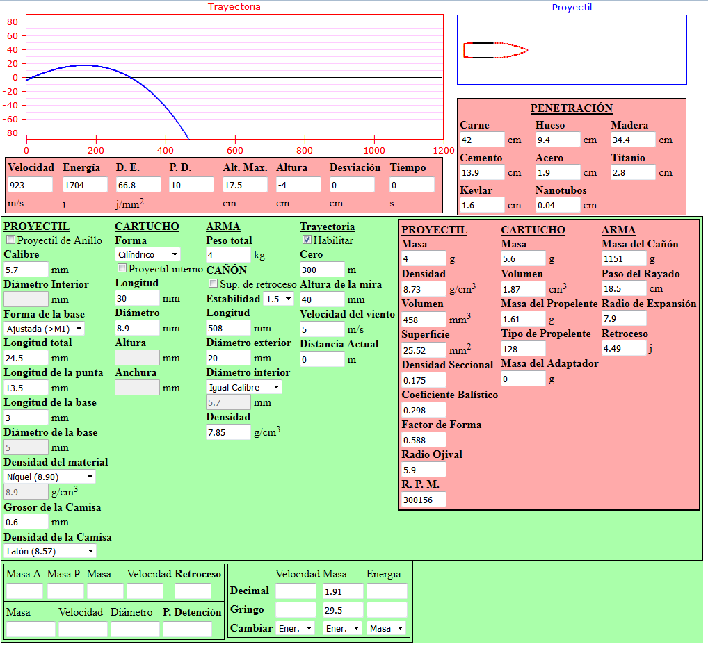 Calculadora o simulador de balística interna, externa y terminal. Sirve para diseñar cartuchos y estimar su rendimiento.